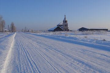 Село Акинфиево